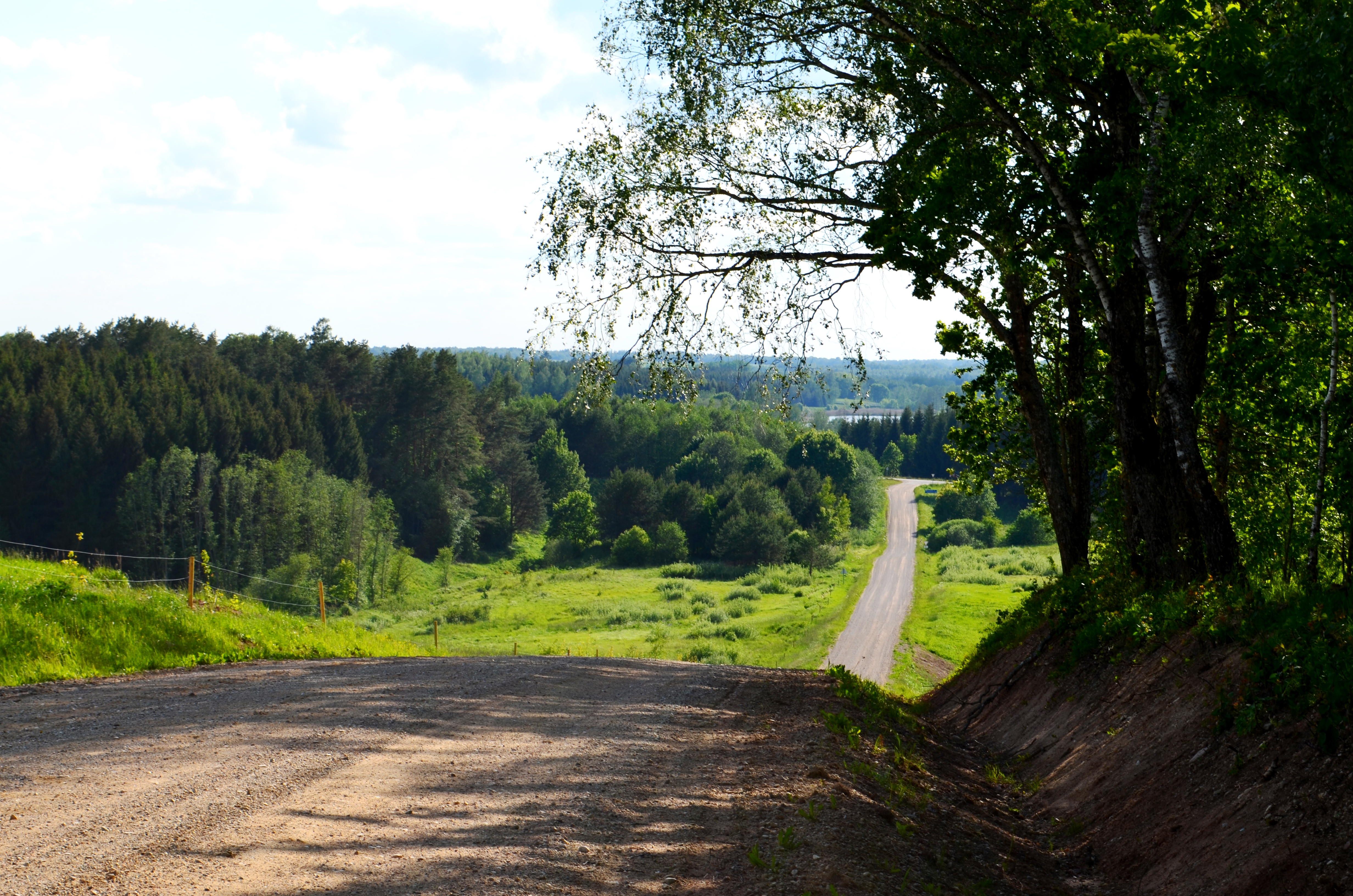 Reginys link ežerų dūburio, ties Antanava, Molėtų raj.